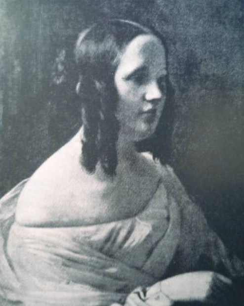 Charlotta Piepenhagen (1821-1902) na dobovém portrétu